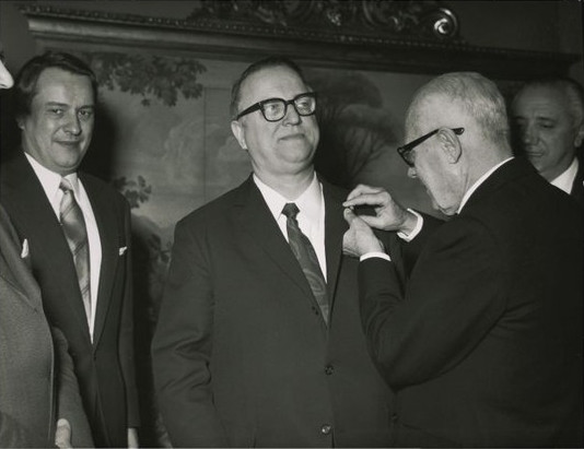 Il Presidente della Camera Pertini consegna un'onorificenza a Walter Behrendt, presidente Parlamento Europeo